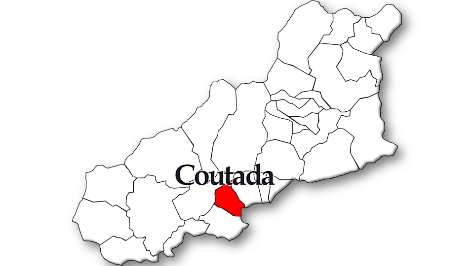 População